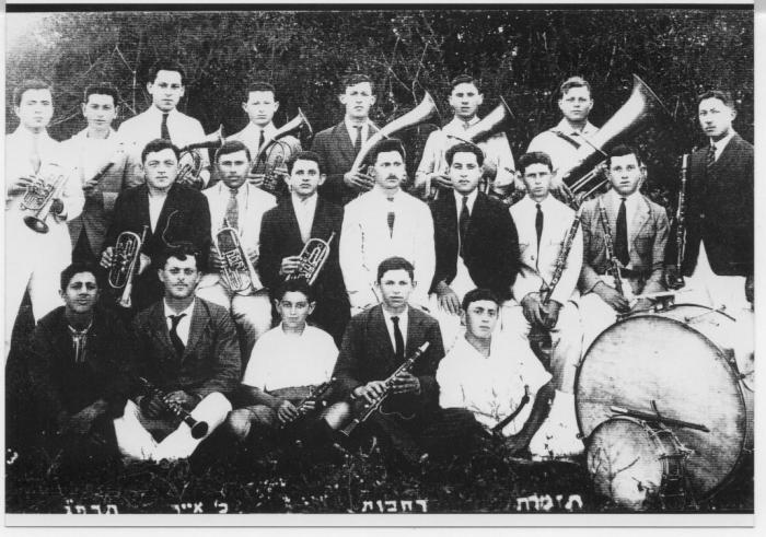 תזמורת רחובות כ' באייר, תרפ"ג